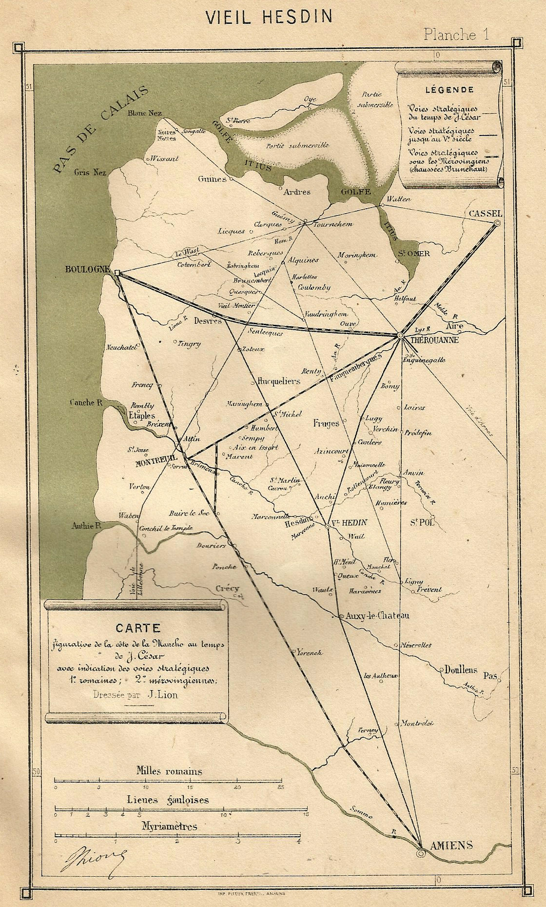 Portus-Itius hervez Jules-Lion, 1905